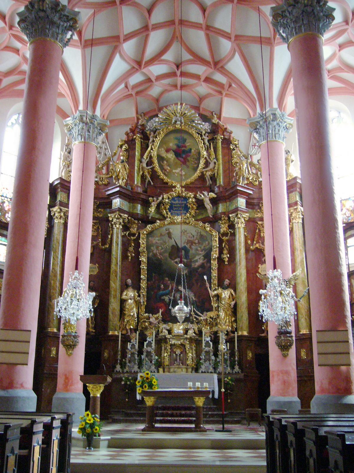 Inneres der Pfarrkirche zur Heiligen Maria Magdalena in Scheibbs